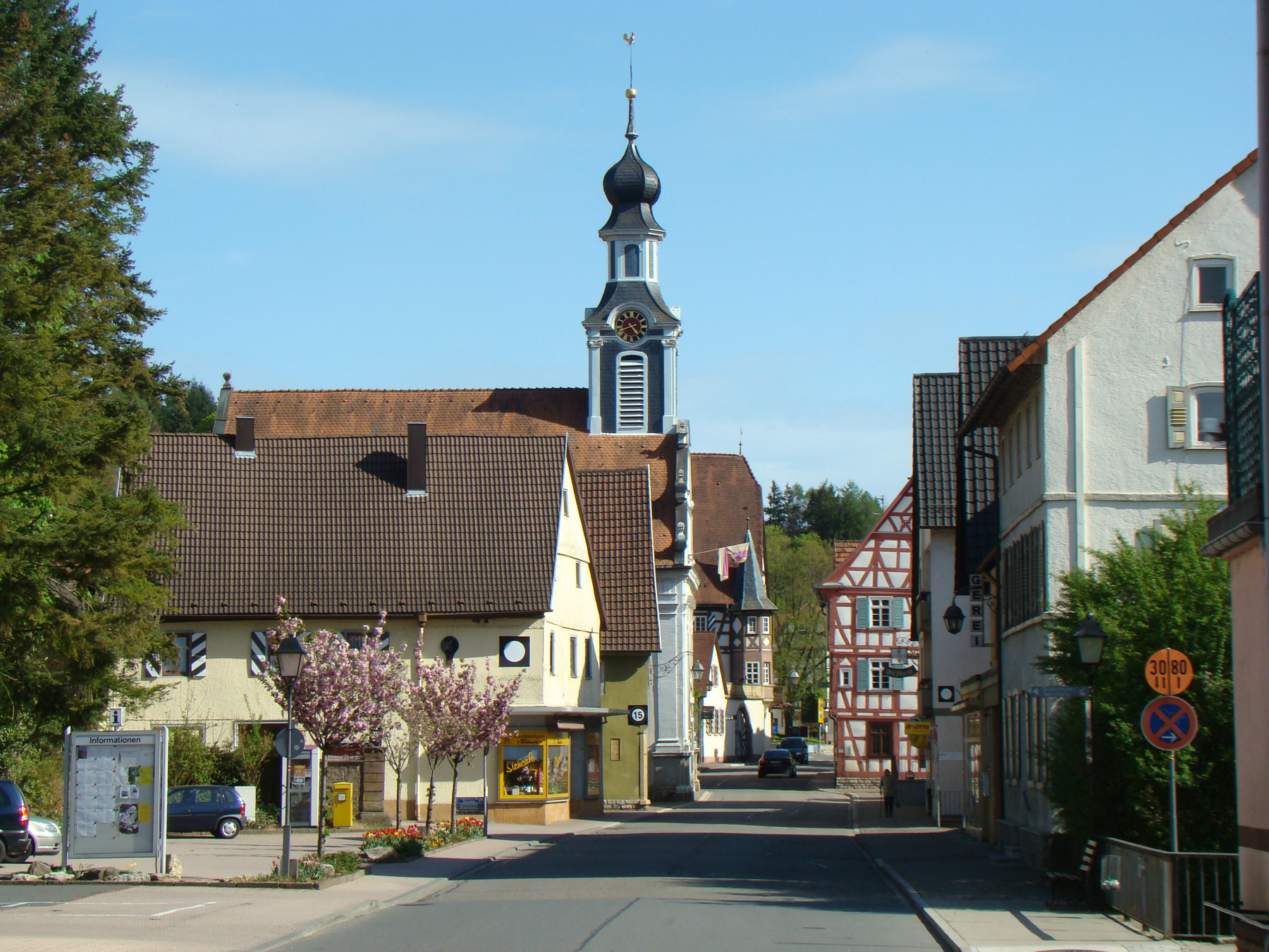 Hauptstraße in Adelsheim